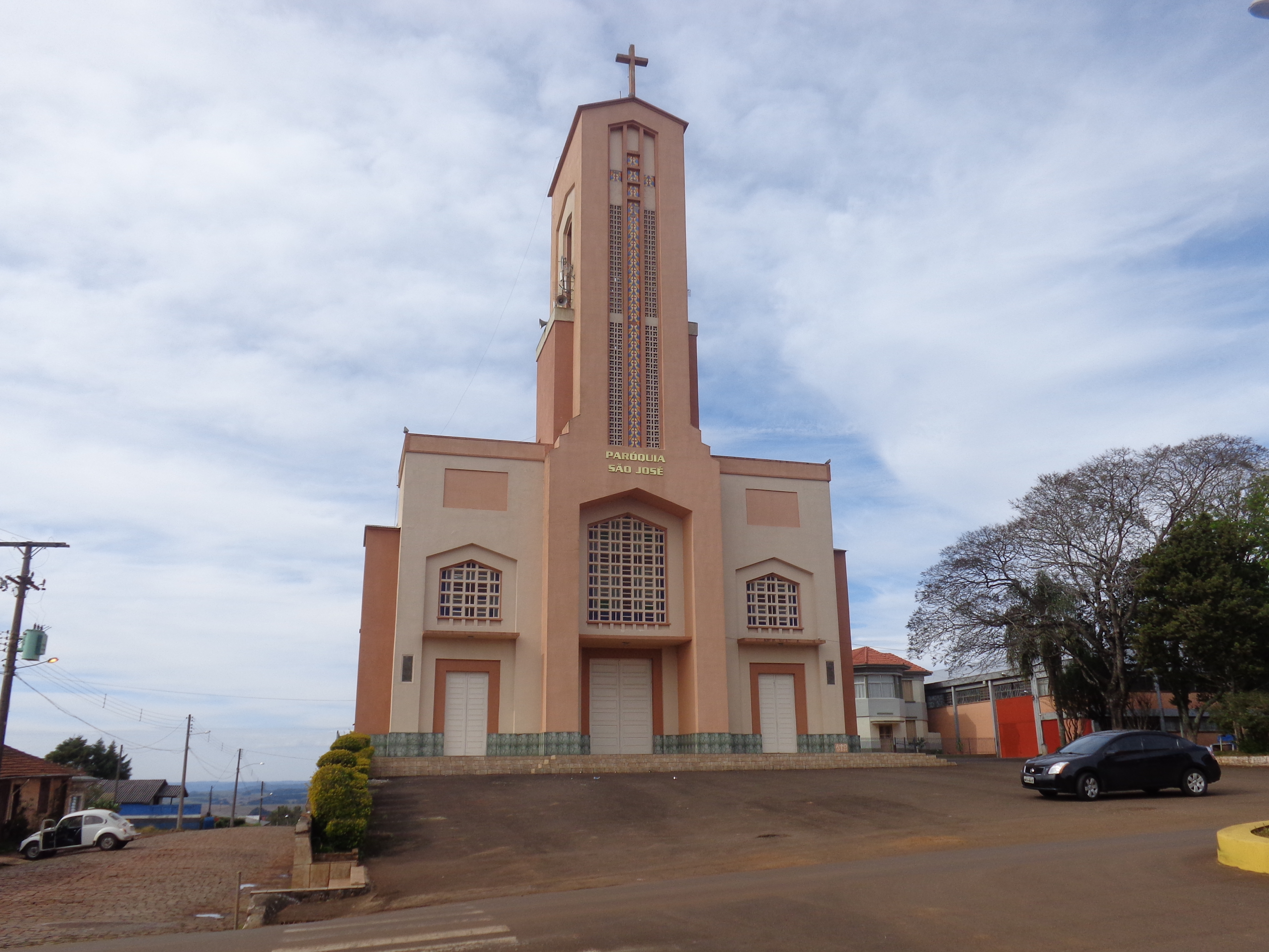 Igreja Matriz de Sertão, Rio Grande do Sul